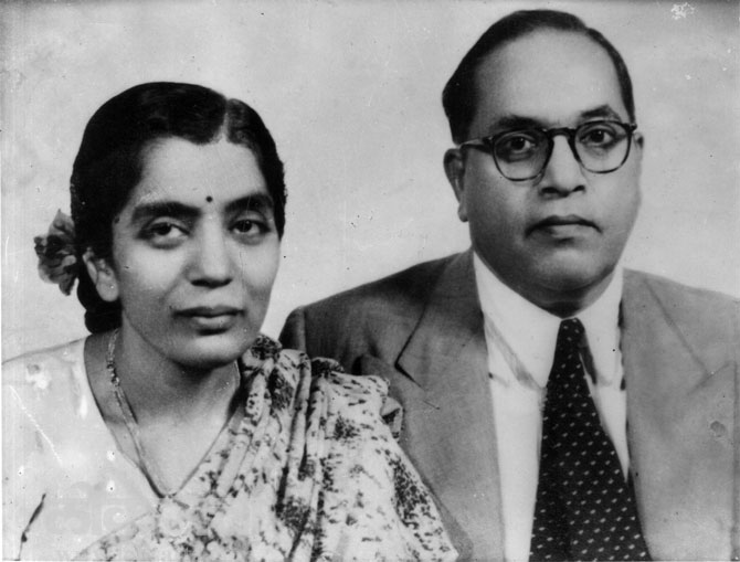 डॉ. बाबासाहेब आंबेडकर व डॉ. शारदा कबीर (नंतर डॉ. सविता आंबेडकर) यांचे दिल्ली येथे विवाह सपन्न झाल्यानंतरचे छायाचित्र.